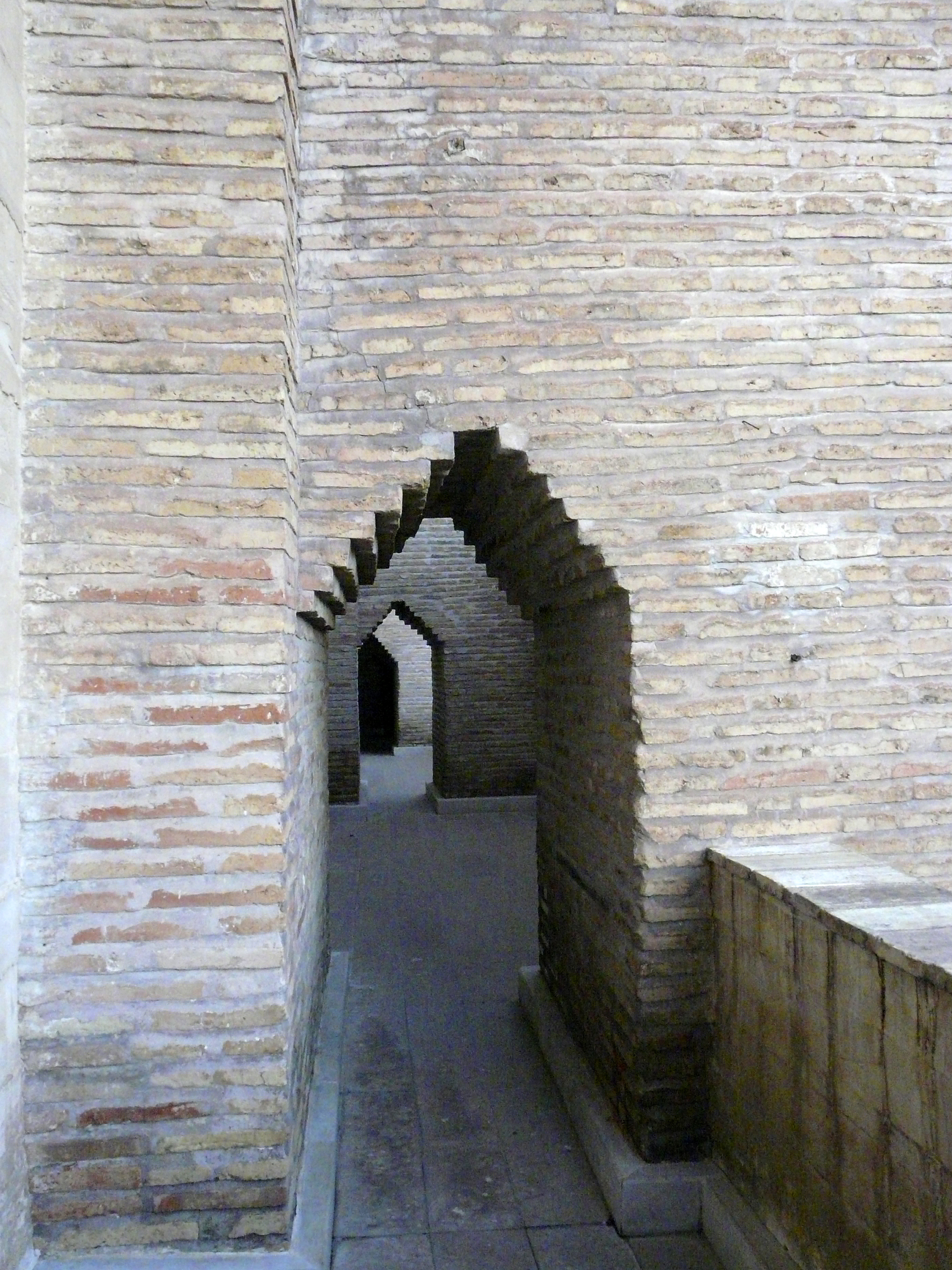 Ándito que rodea exteriormente la Iglesia de San Pedro (Teruel), Aragón, España. Siglo XIV.